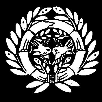 竹に雀(仙台笹)